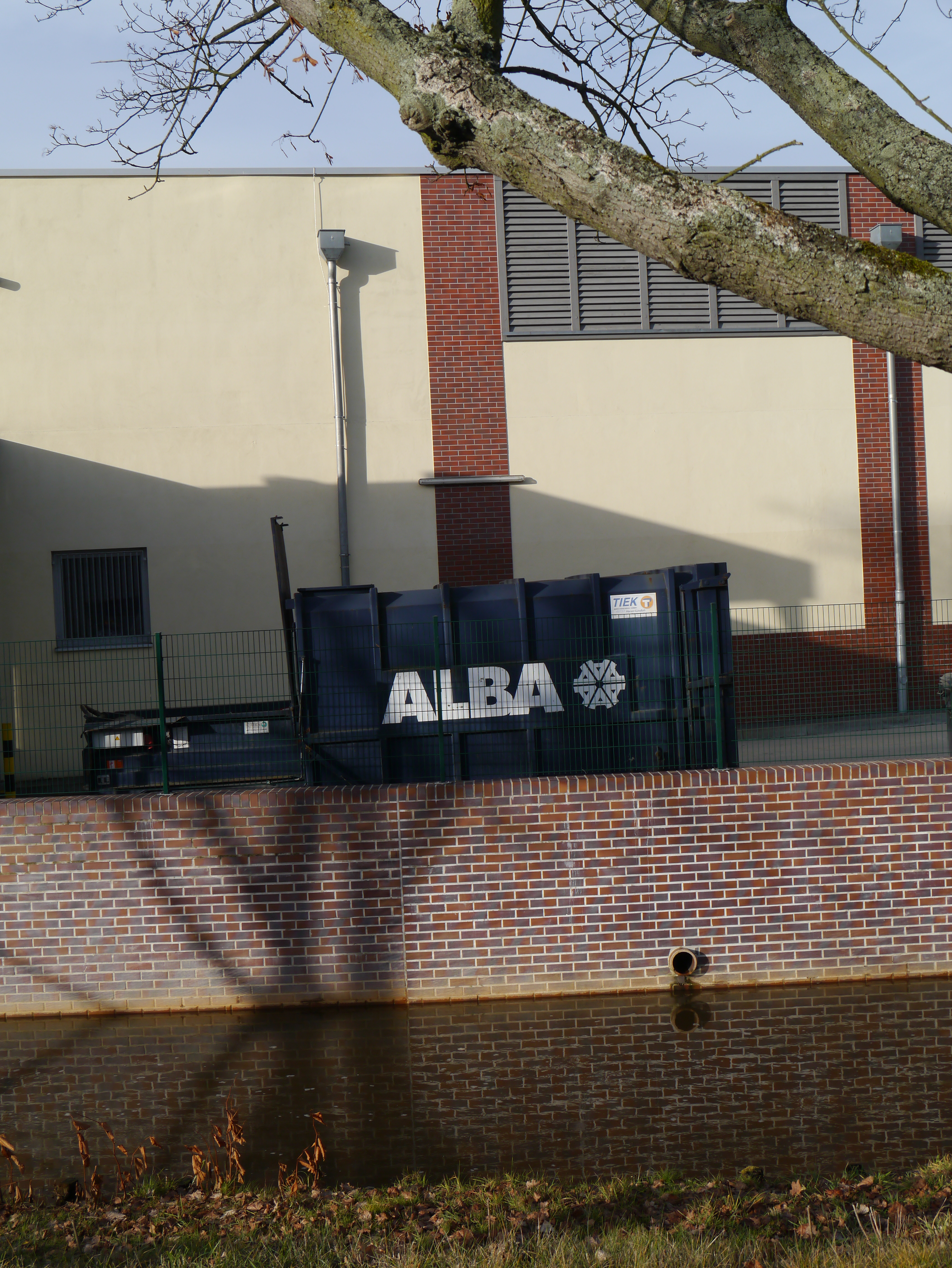 ALBA Container, Doberlug-Kirchhain